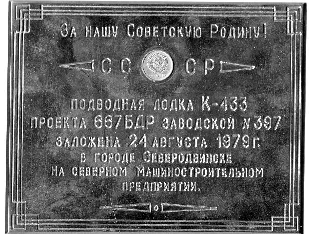 Закладная доска пл К-433